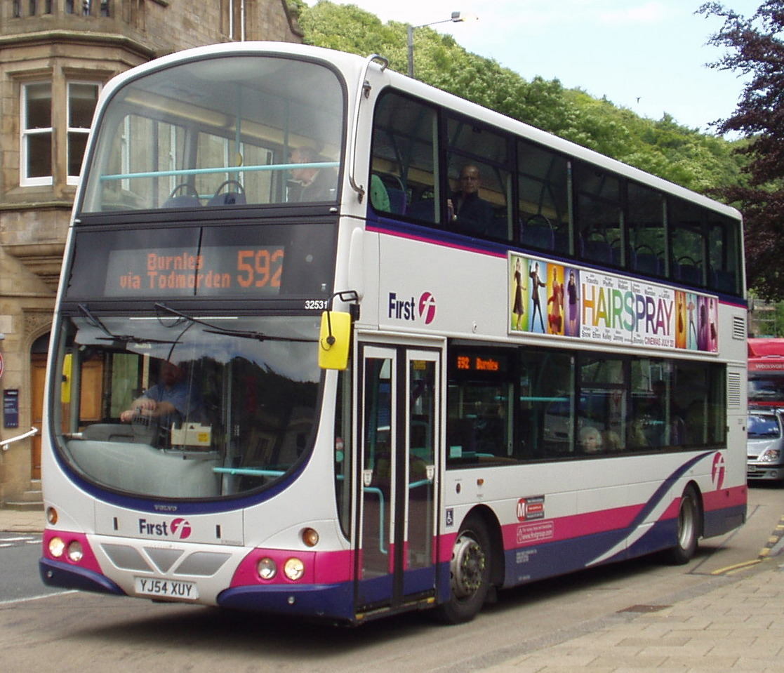 First Volvo/Wright Eclipse Gemini double-deck bus in Hebden Bridge.